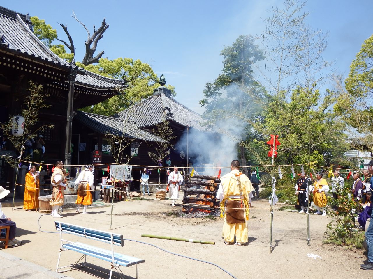 志度寺の柴燈護摩